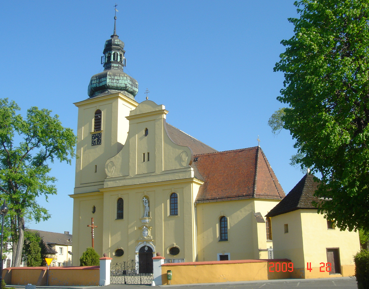 Tarnów Opolski - kościół rzymskokatolicki, parafialny pw. św. Marcina Biskupa.